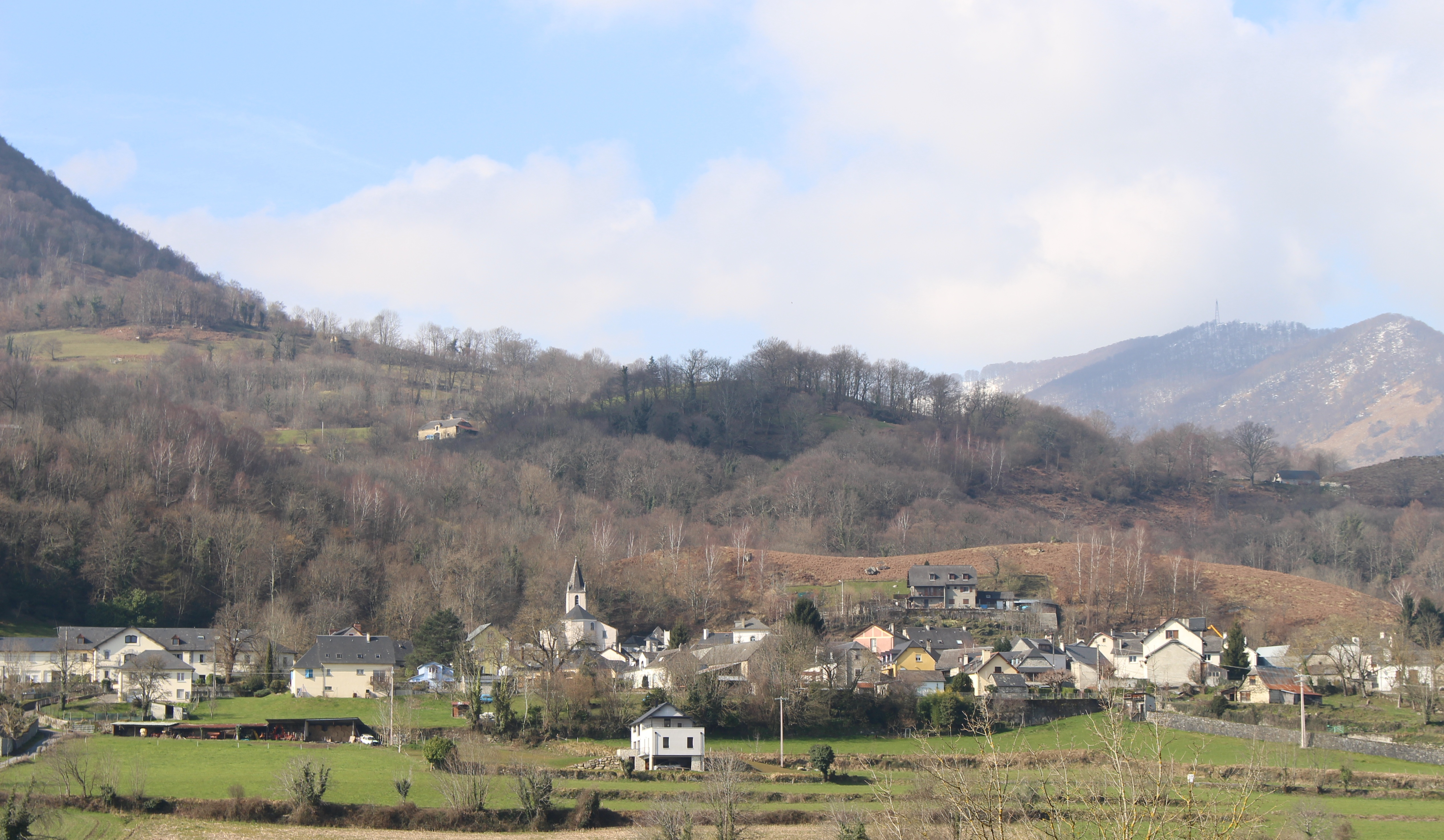 Ségus (Hautes-Pyrénées)